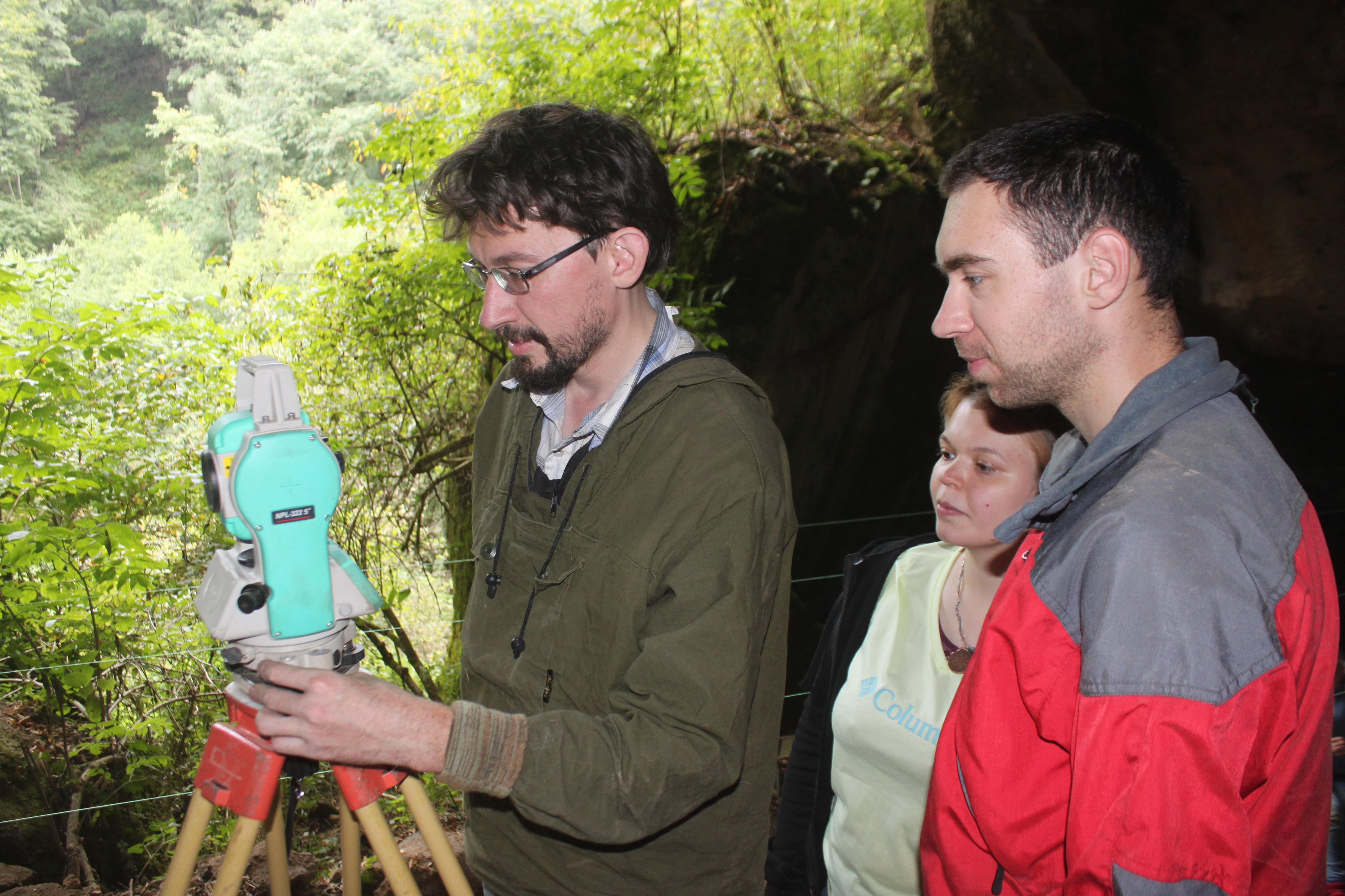 Фиксация находок